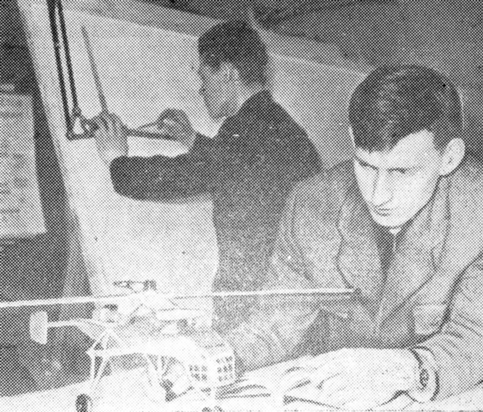 На снимке: Лев Баньковский (студенческое конструкторское бюро СКБ-2 «Вертолёт») знакомится с материалами по реактивным вертолётам. Источник: газета "Пропеллер". – 1960. – 06 апреля 1960 (№ 12 [1241]). (для статьи Wiki Лев Владимирович Баньковский)